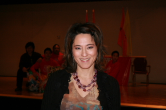 Portrait de la journaliste canadienne Nathalie Chung.